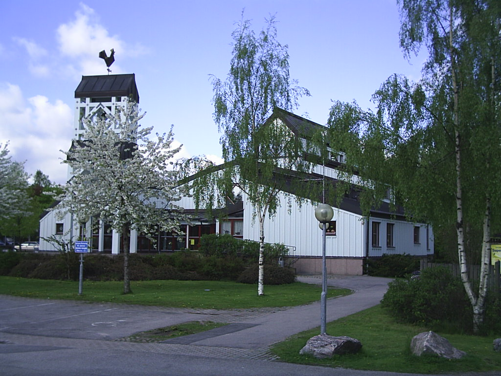 Skogshöjdens kyrka i stadsdelen Skogshöjden och tillhör Trollhättans församling. Fotograf: Tubaist